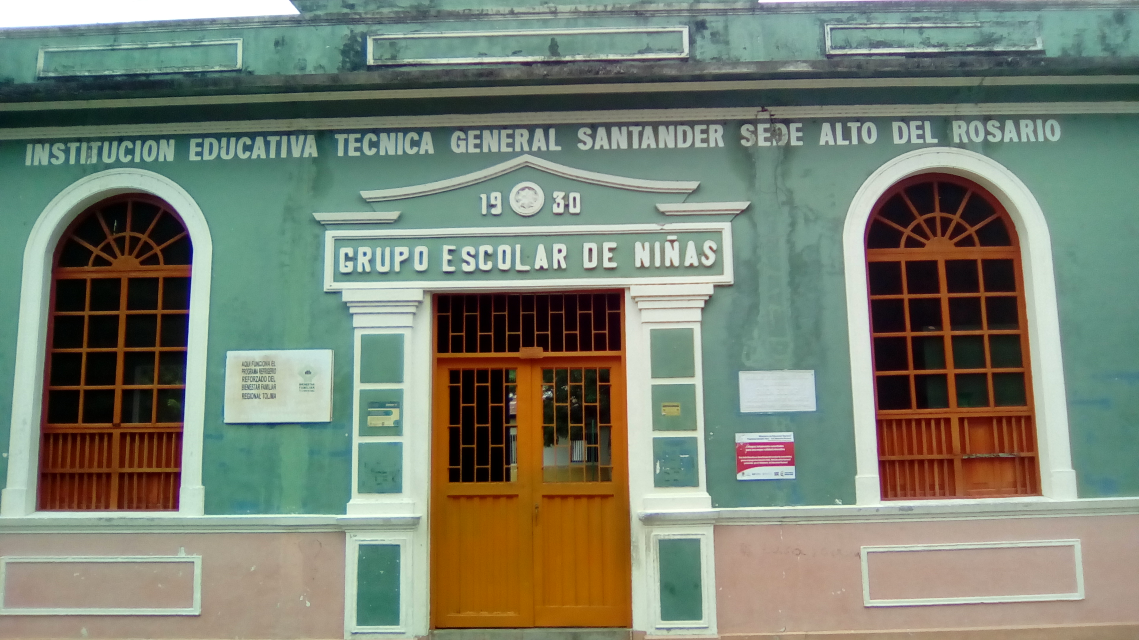 Institución educativa técnica General Santander en Honda, Tolima